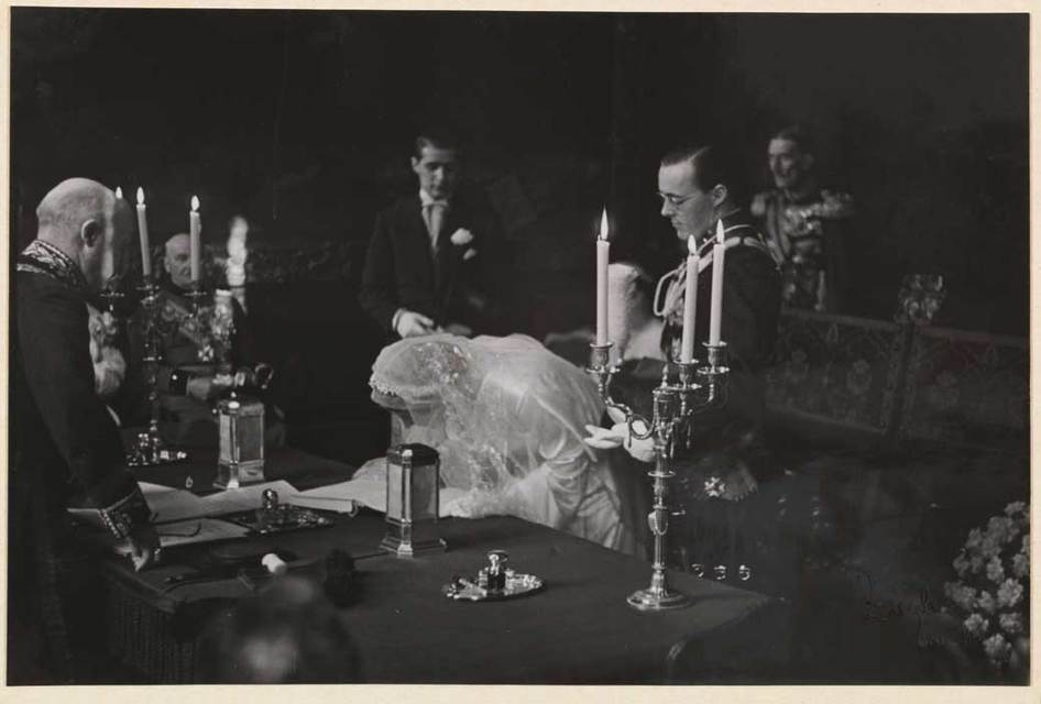 Burgerlijk huwelijk, 7 januari 1937 Een mooi sfeerbeeld in het oude Haagse stadhuis aan de Groenmarkt op 7 januari 1937: Prinses Juliana tekent de huwelijksakte terwijl de bruidegom, rechtsvoor staande, toekijkt.